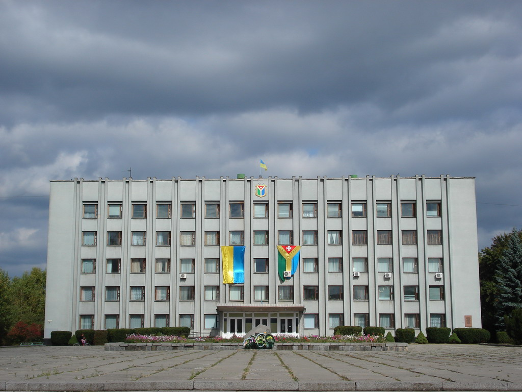 Будинок міськой адміністрації міста Шепетівка